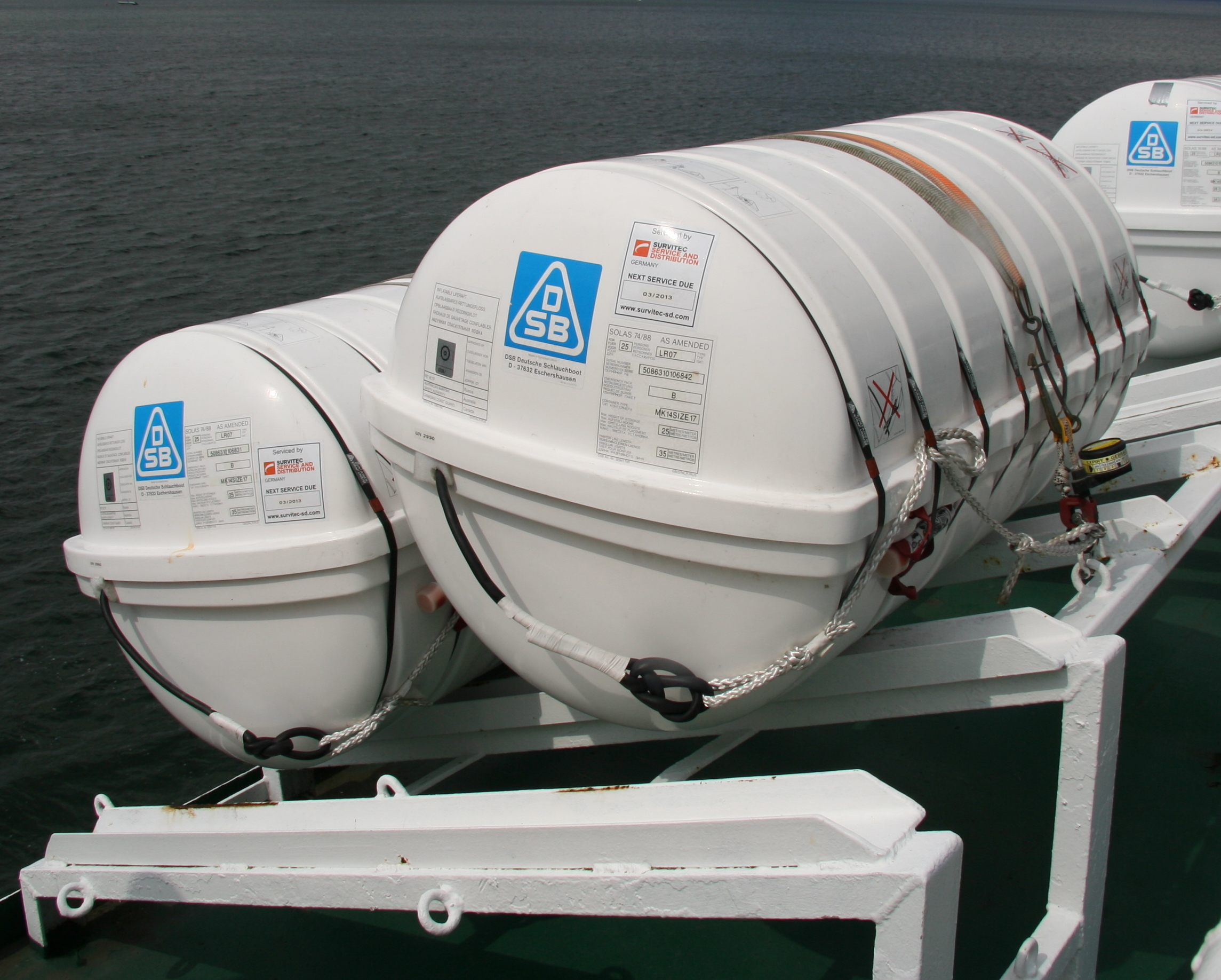 Rettungsfloss von DSB auf der Dania